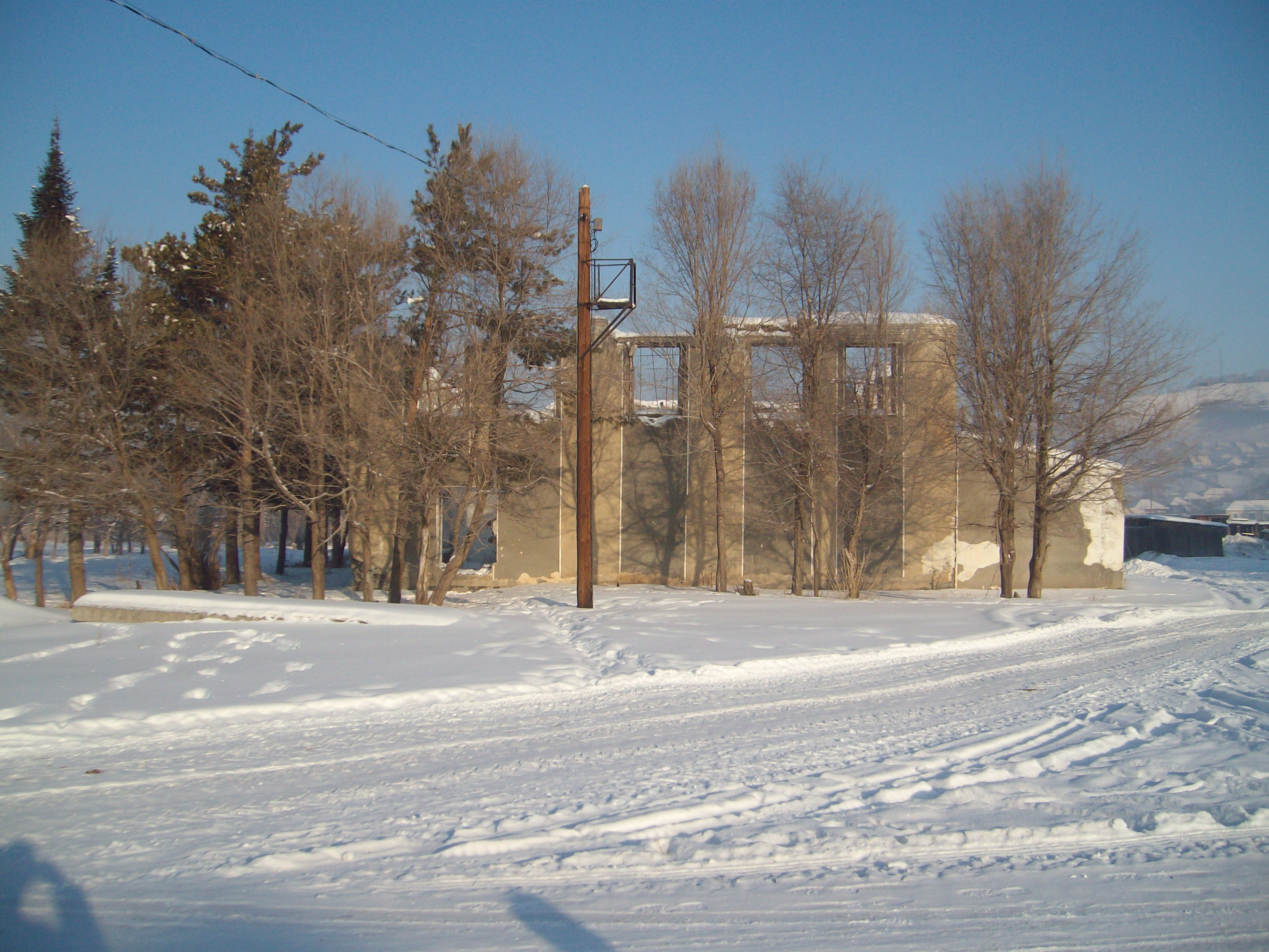 Руины клуба Совхоза Медведевский в с. Солонешное, февраль 2008 г.